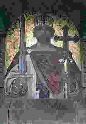 Foto de la muzaikbildo de la monumento de Karolo la Granda en Rechtenfleth